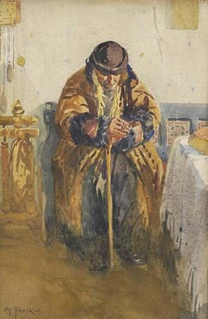 Česky: Sedící stařec